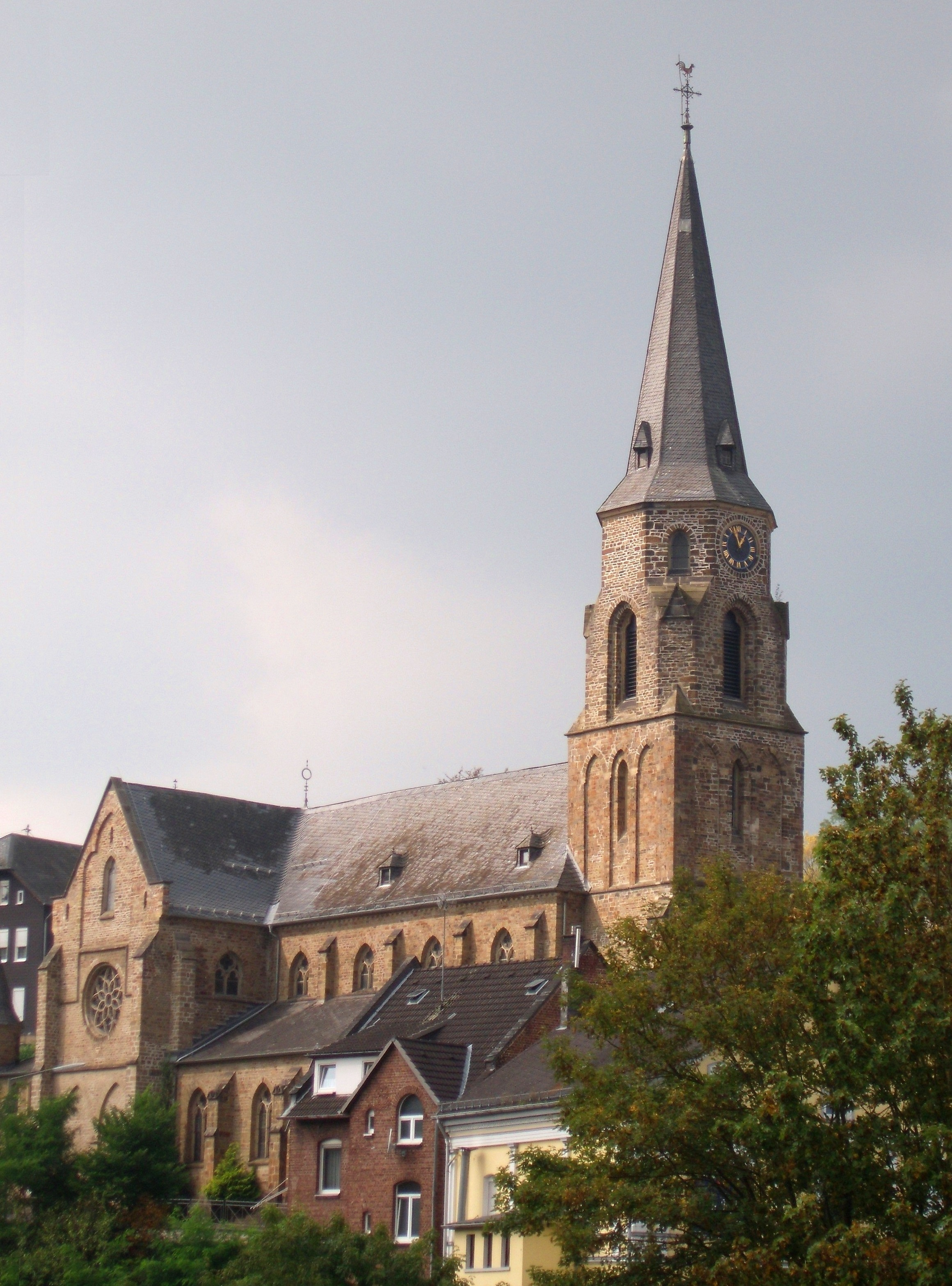 Kath. Pfarrkirche St. Ignatius, Betzdorf